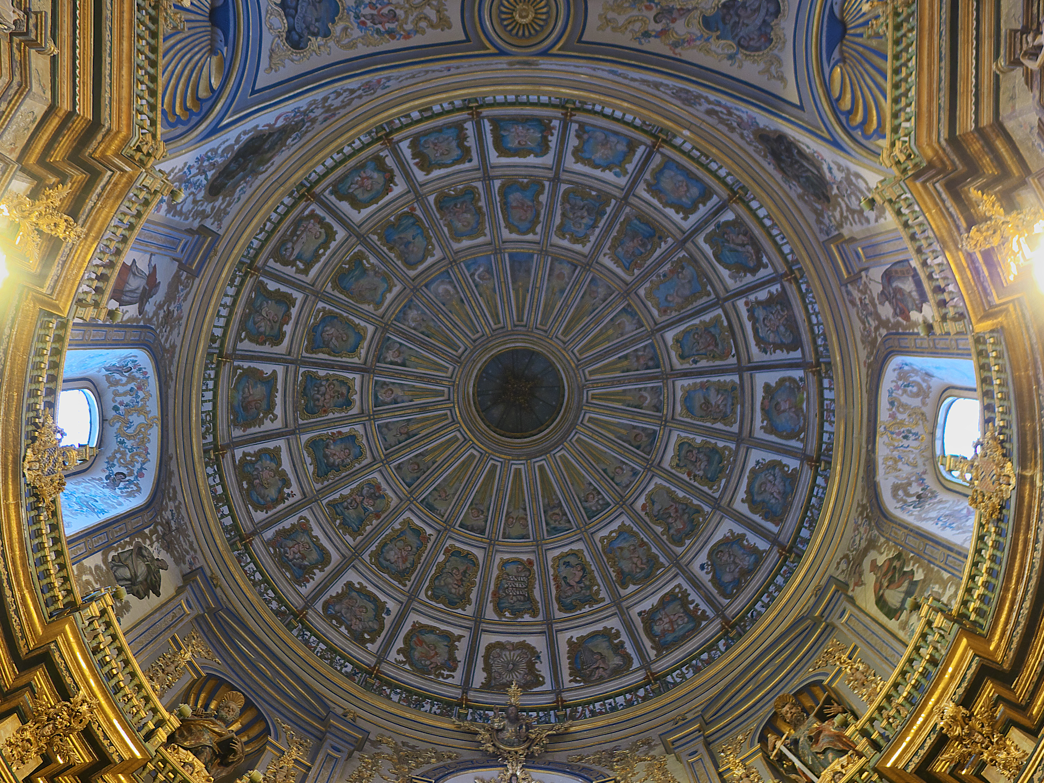 Diego de Siloé, conocía el cinquecento italiano, en el que había trabajado. Para El Salvador, proyecta una soberbia cúpula, destinada a solemnizar el espacio funerario de la obra, cuya principal fuente podría ser el Panteón de Agripa